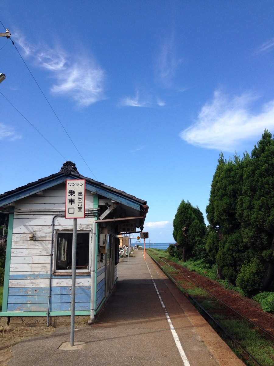 Etchu-kokubu Sta.